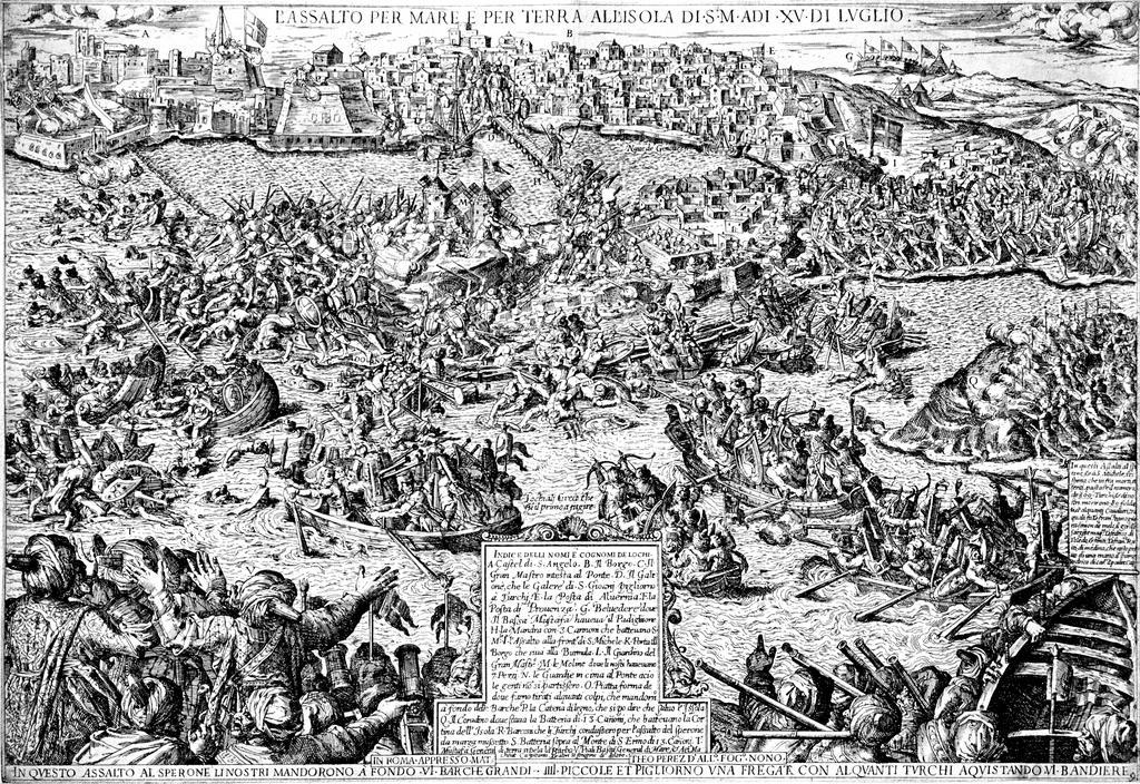 Great siege of Malta